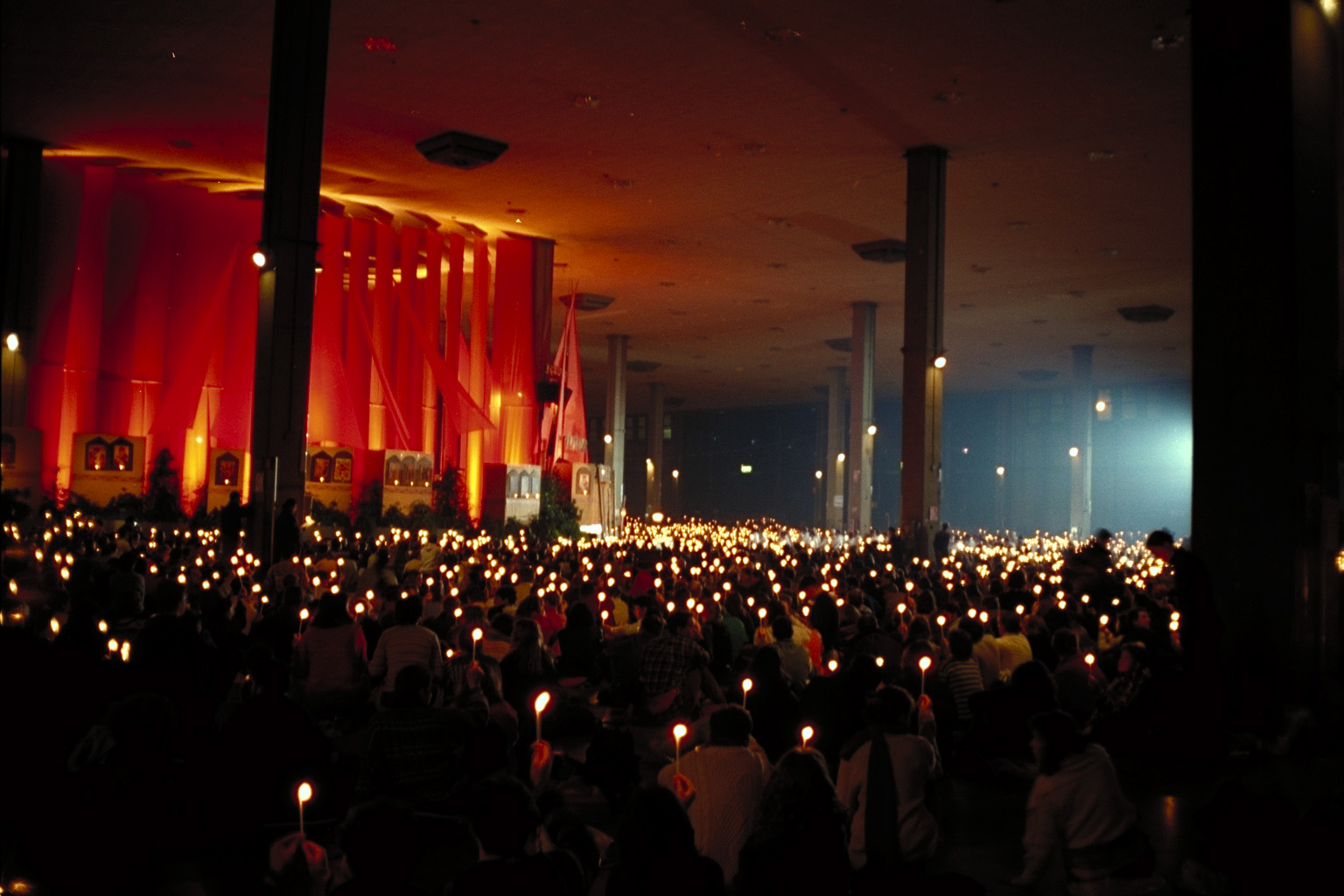 Prayer in Milan 1998.